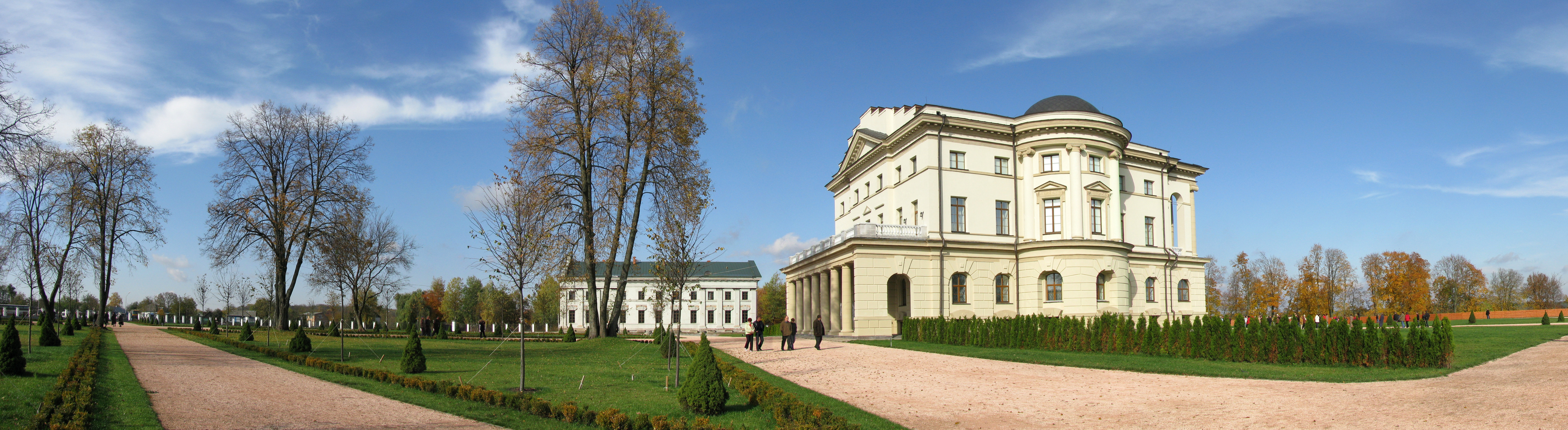 Парк біля палацу К. Розумовського, Батурин, вул. Набережна, 1